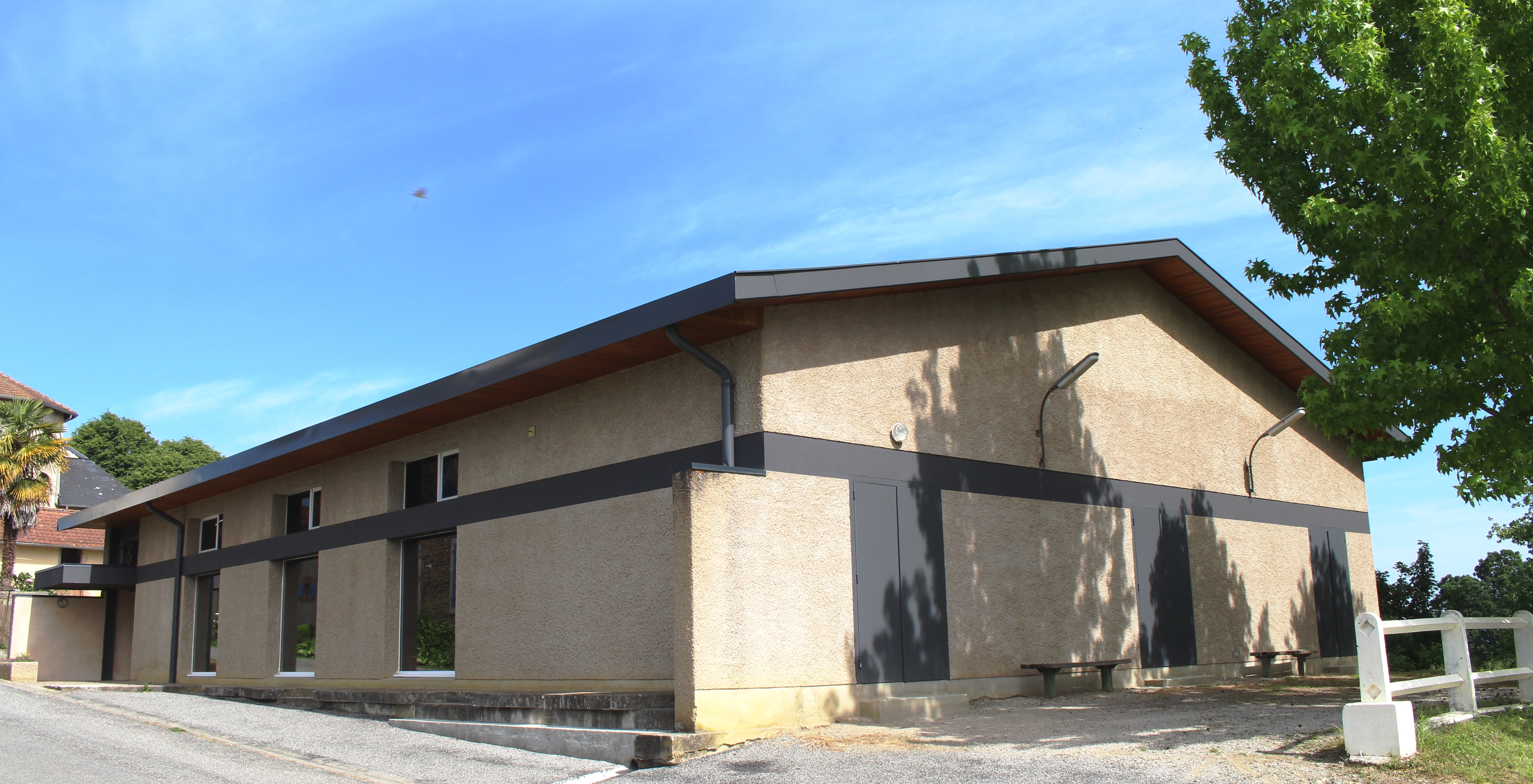 Salle des fêtes de Castelvieilh (Hautes-Pyrénées)